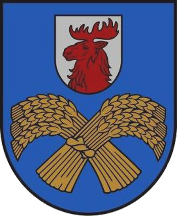 Kategorija:Jelgavas novads Kategorija:Latvijas novadu ģerboņi